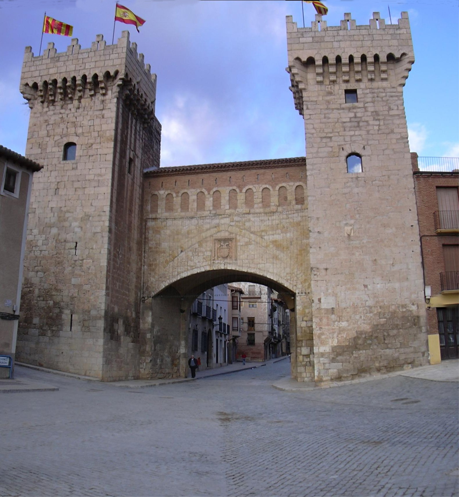 Daroca - Puerta baja de la muralla